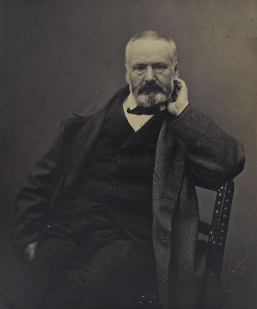 Victor Hugo photographié par Gilbert Louis Radoux le 5 mai 1861. Référence bibliographique : Jean-Marc Gomis, « Sur l'attribution de la photographie de Hugo du 5 mais 1861, la première (?) où il porte la barbe », Groupe de travail universitaire sur Victor Hugo (Paris 7), lire en ligne.